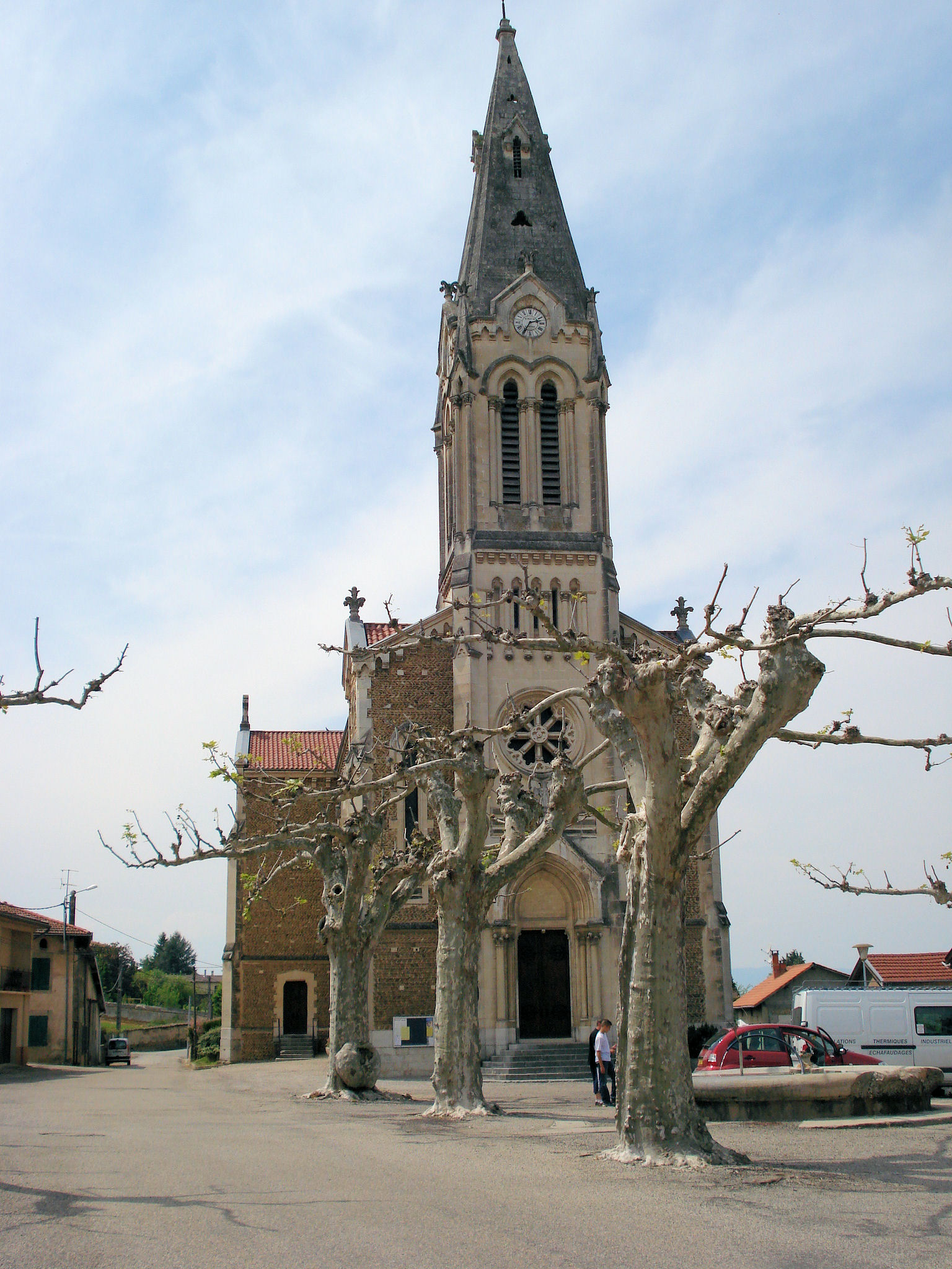 église Saint Jean-Baptiste de Lens-Lestang datant du début du XXème siècle